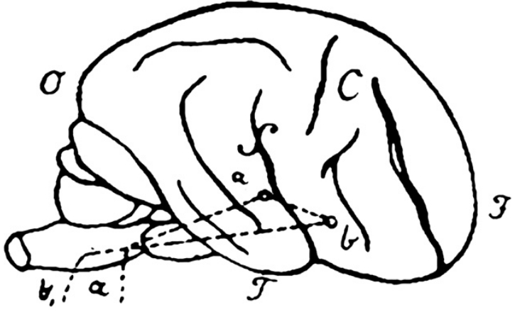 Зона Вернике из собственной статьи Вернике.